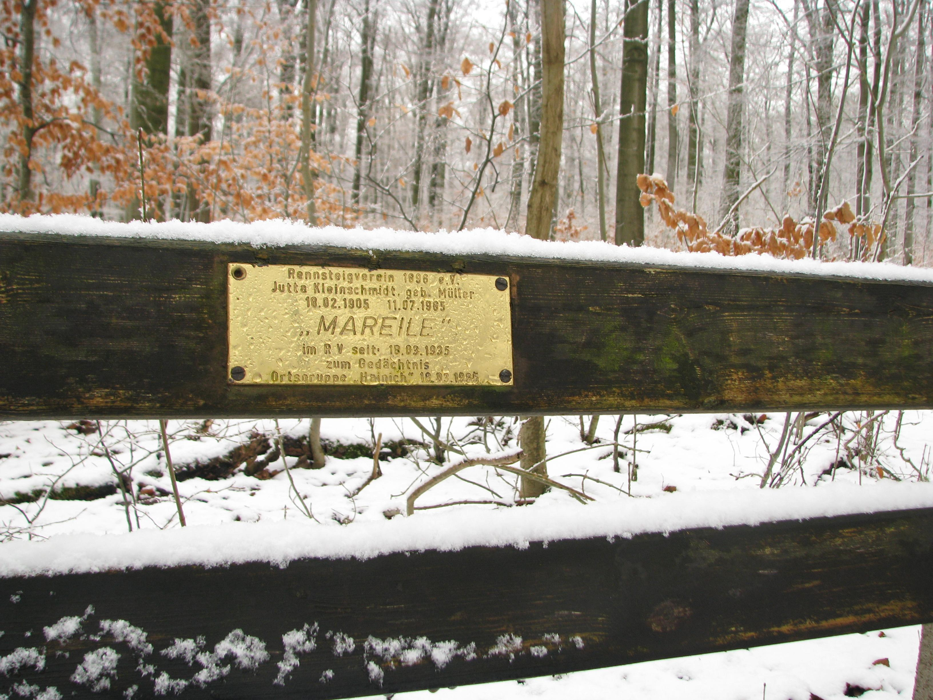 Mareile-Bank am Rennstieg im Hainich.